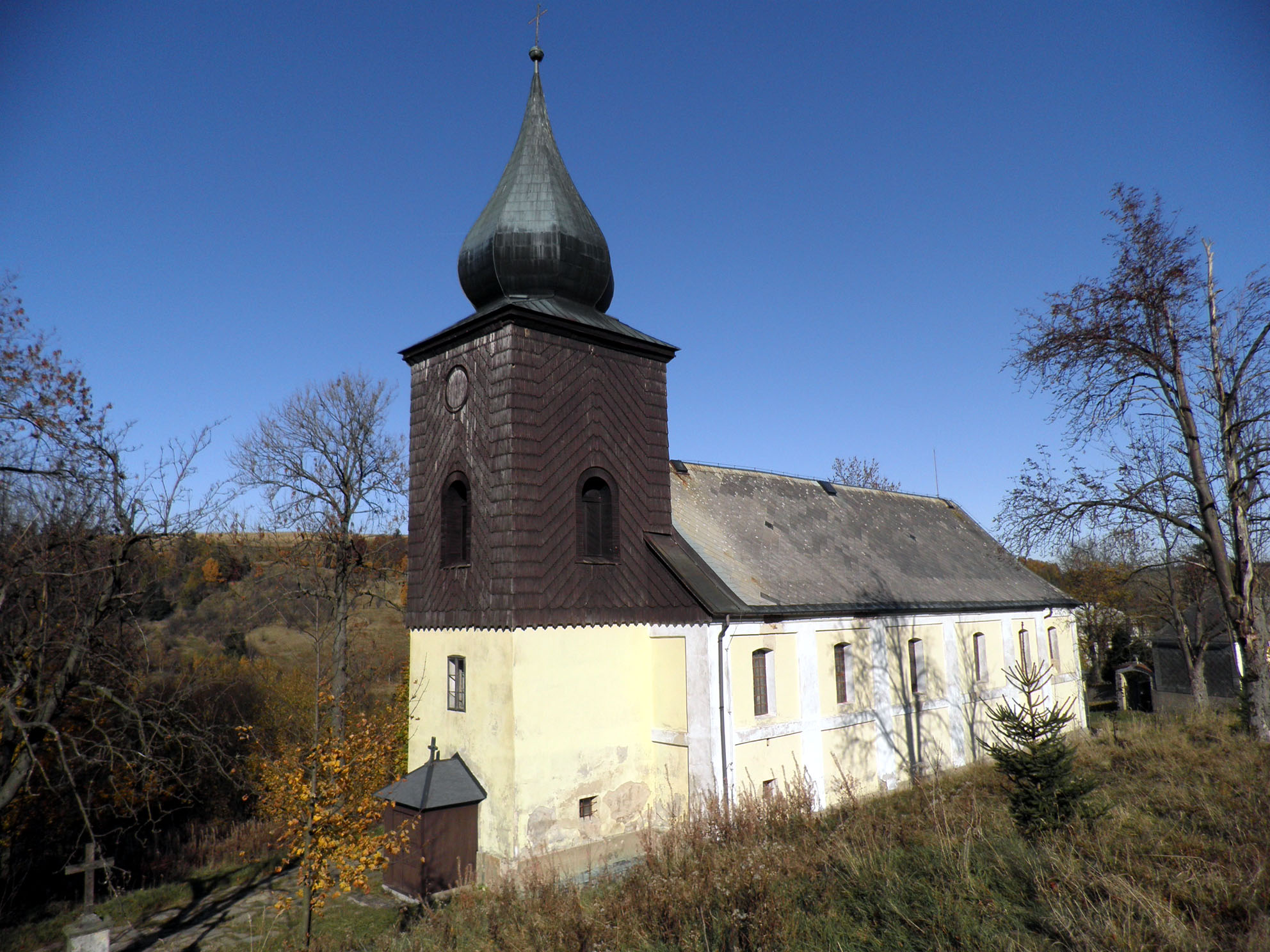 Kostel Navštívení P. Marie, Moldava, okres Teplice